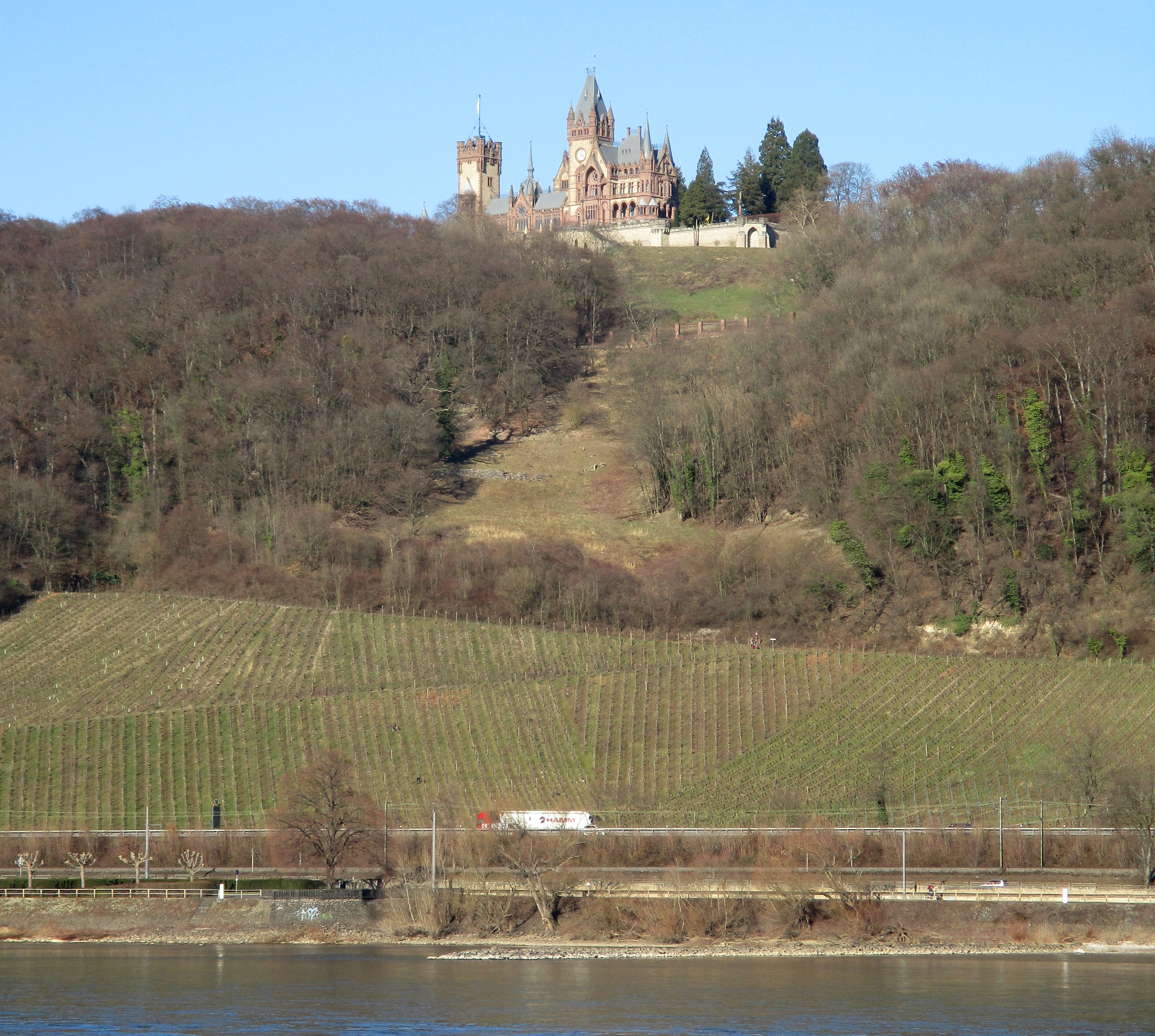 Blick vom Rheinufer in Mehlem zu den Weinbergen am Drachenfels (unten), dem ehemaligen Standort des Weinguts Rüdenet (Mitte) und Schloss Drachenburg (oben)